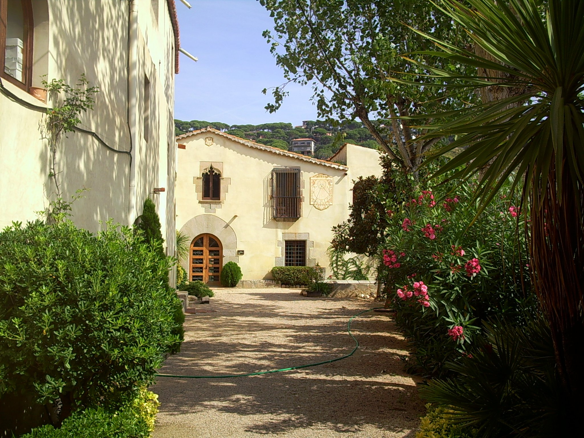 Can Bartomeu amb dues finestres conopials, (segle XVI). L'edifici va ser modificat i ampliat el 1779, tal com s'indica al rellotge de sol. Cabrera de Mar, el Maresme, (Catalunya).